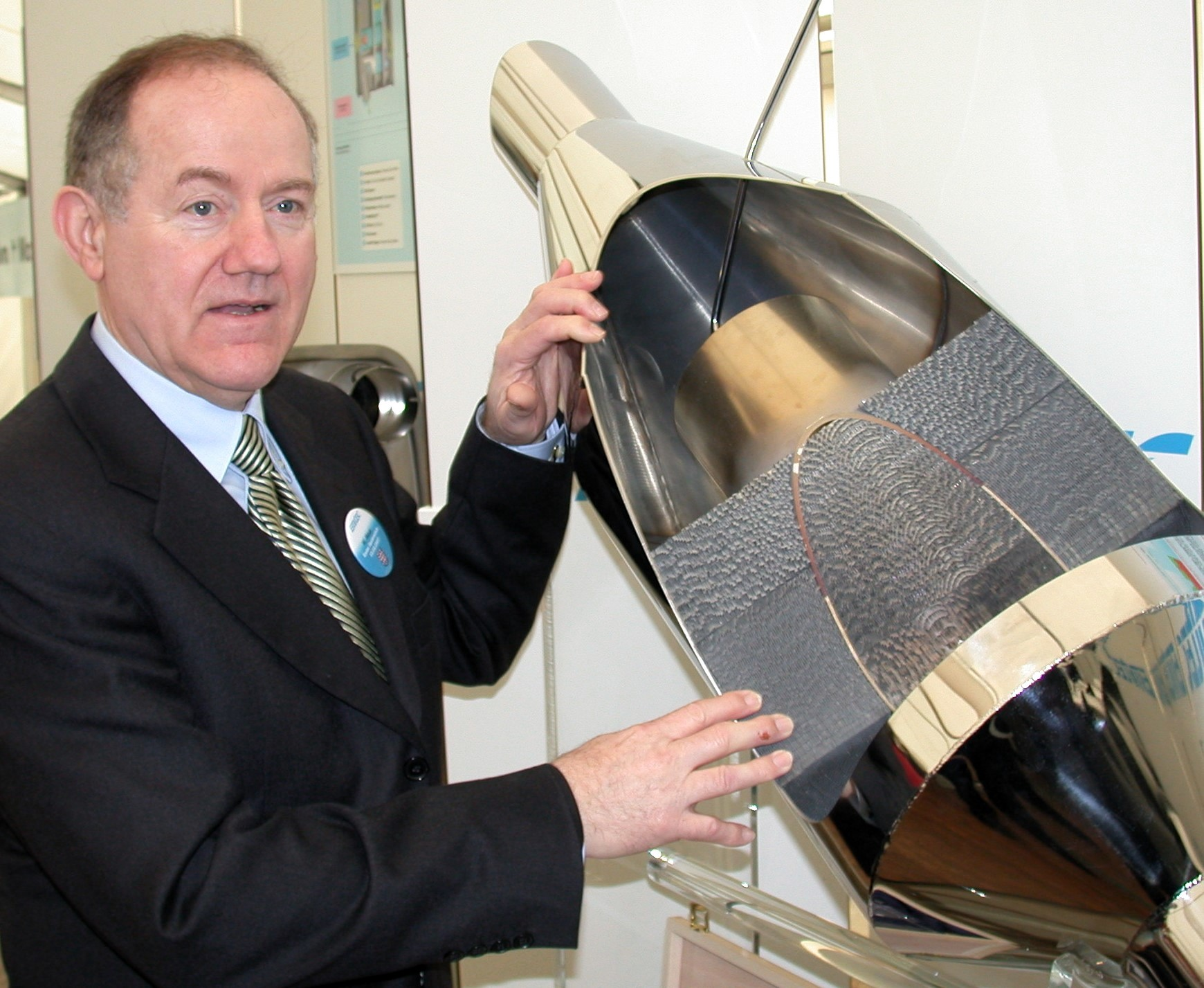 Wolfgang Maus im Februar 2007 im Emitec-Werk in Eisenach